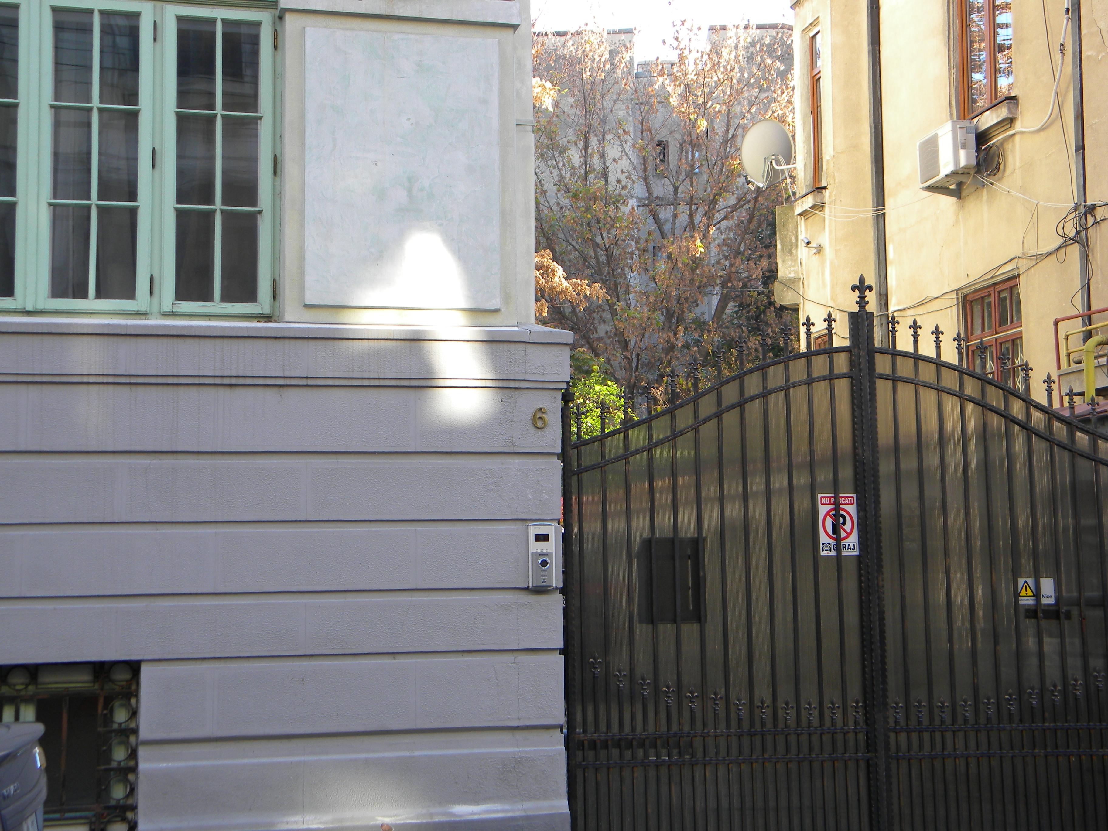 Bucuresti, Romania, Str. Alexandru Philippide nr. 6, sect. 2 (Cod B-II-m-B-19379) (2 prim)